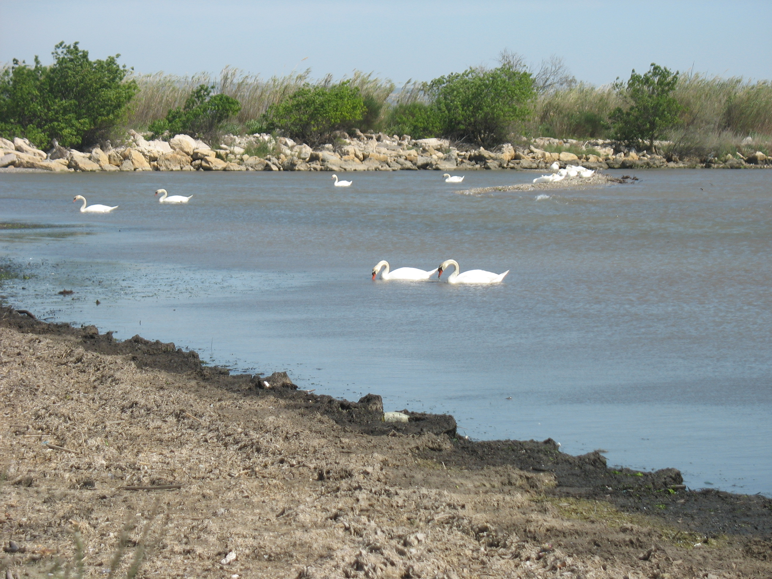 Paysage de camargue. Etang de Berre, Bouches du Rhône, France